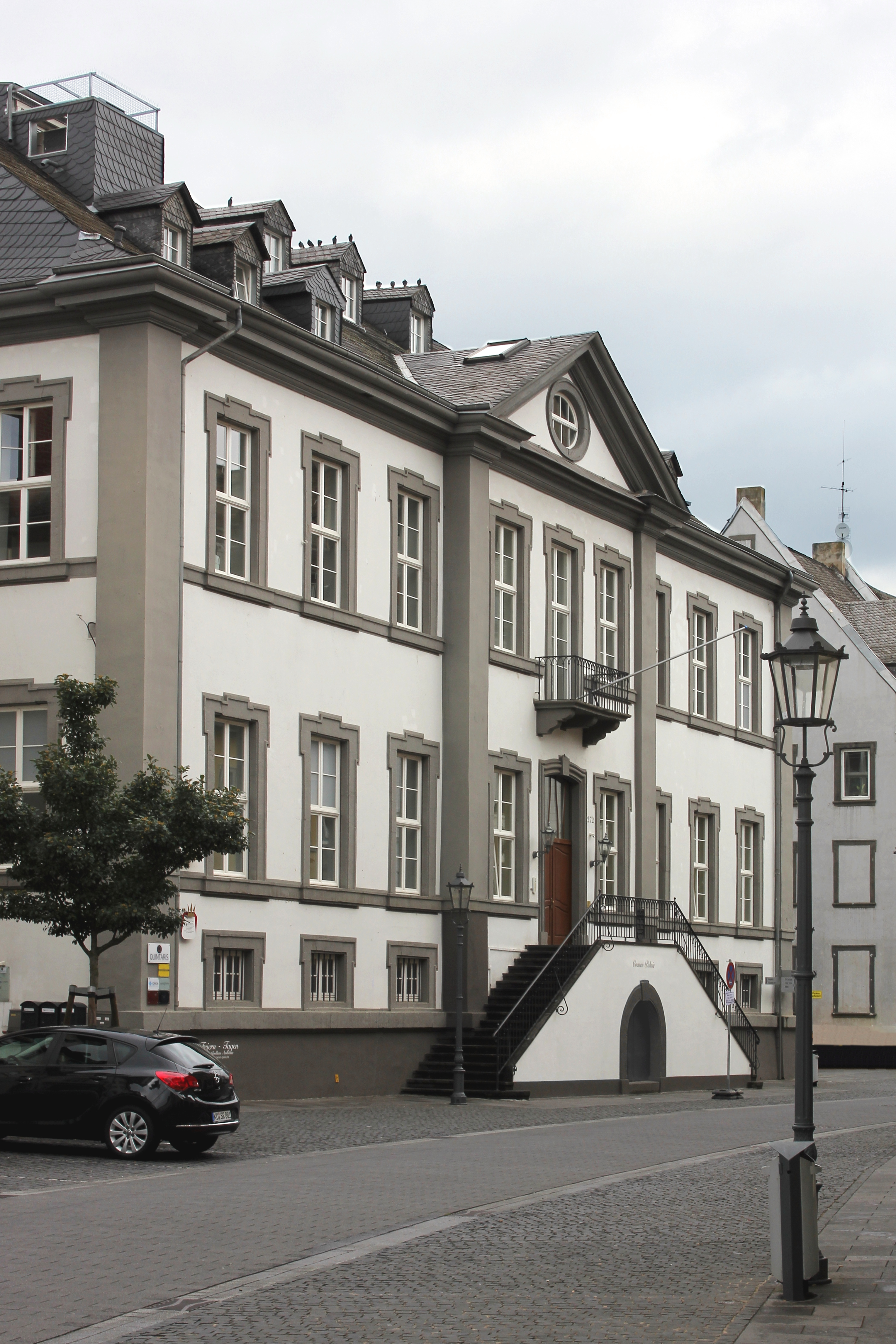 Koblenz, Hofstraße 272: Coenen'sches Haus, 1713/14 erbaut nach Plänen von Joseph Honorius Ravensteyn unter Landrentmeister H. L. Coenen, 1777–1786 kurfürstliches Dikasterialgebäude, 1833 Gemeindehaus, 1881 Wohnhaus des Kommandanten von Ehrenbreitstein